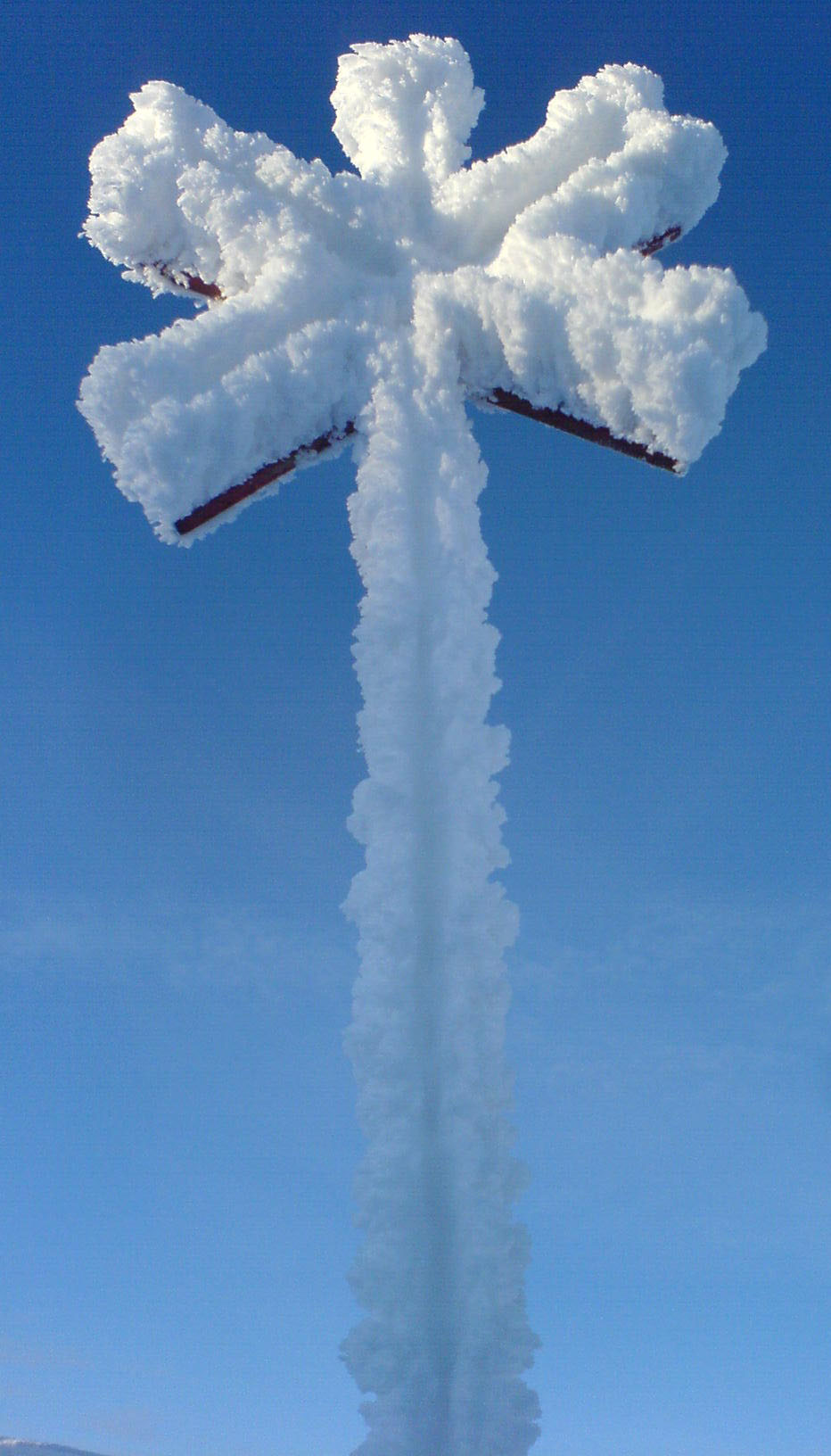 Skoterledsmarkering i Särvfjället i Härjedalens kommun.